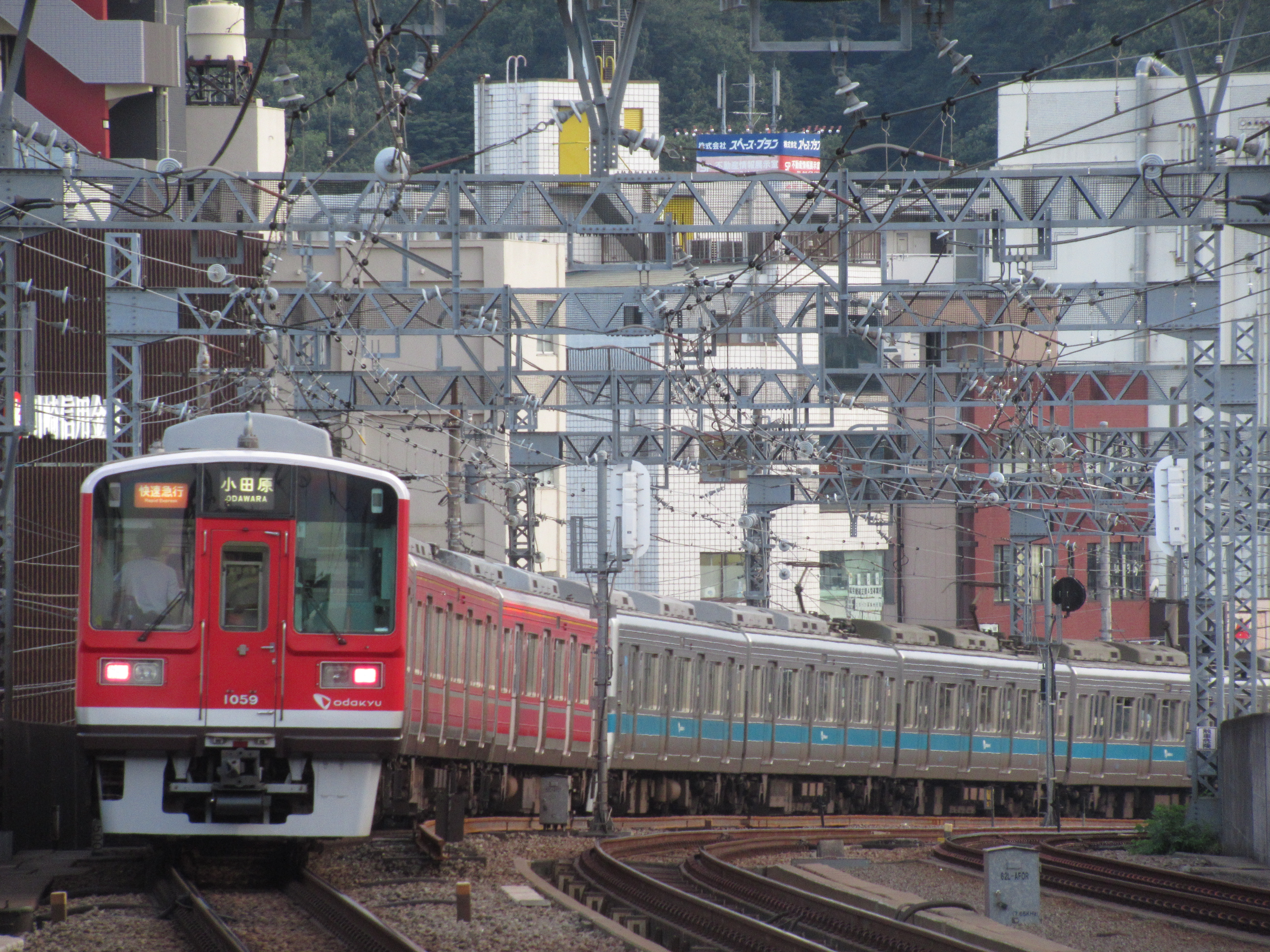 令和元年東日本台風による被害のため長期間運休していた箱根登山鉄道の全線での運転再開を記念して小田急線全線で8月のみ運行された、赤塗装(レーティッシュ塗装)と標準塗装の併結編成。2020年8月3日 登戸駅